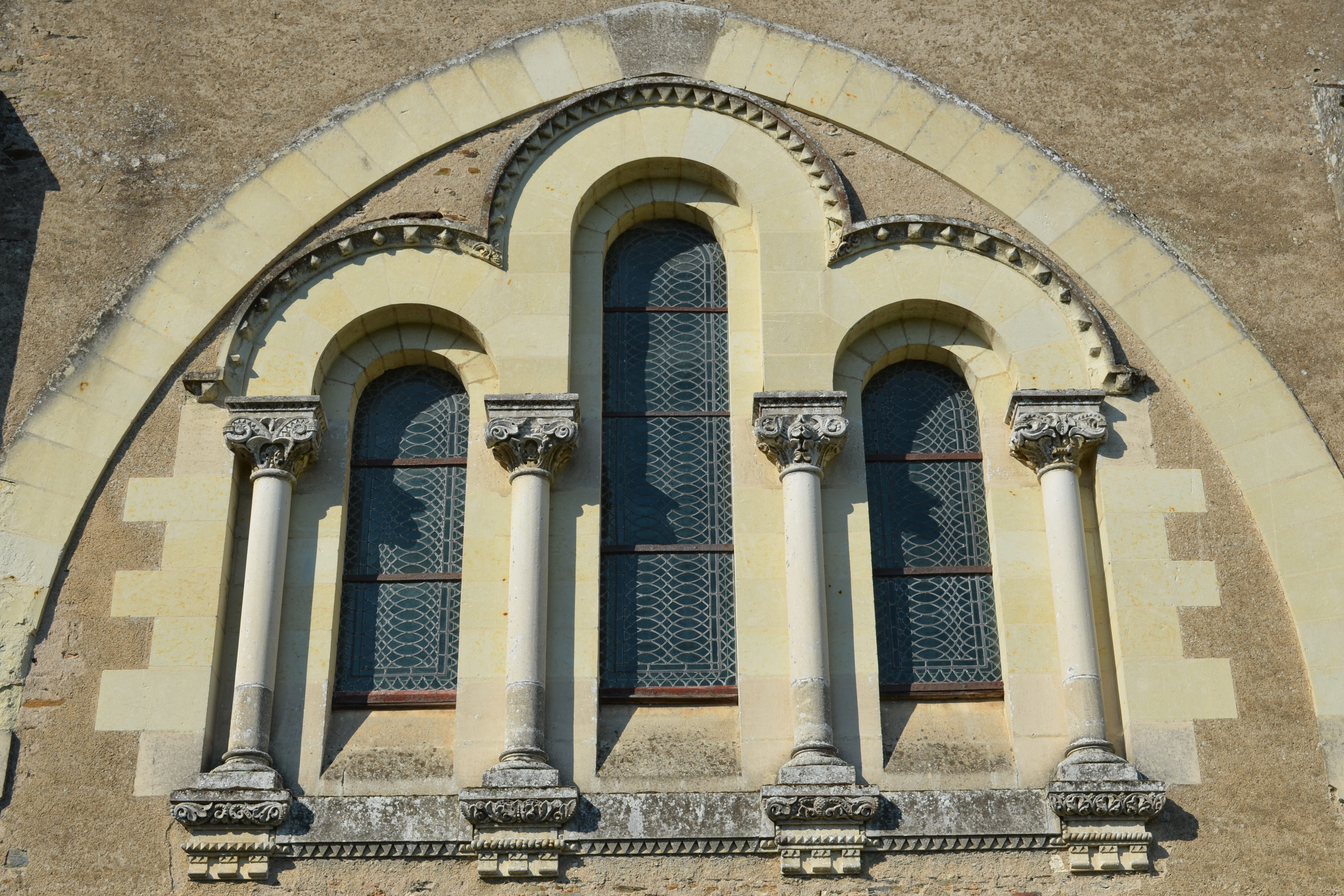 Abbaye Notre-Dame de Melleray - La Meilleraye-de-Bretagne (Loire-Atlantique) This building is en partie classé, en partie inscrit au titre des Monuments Historiques. .